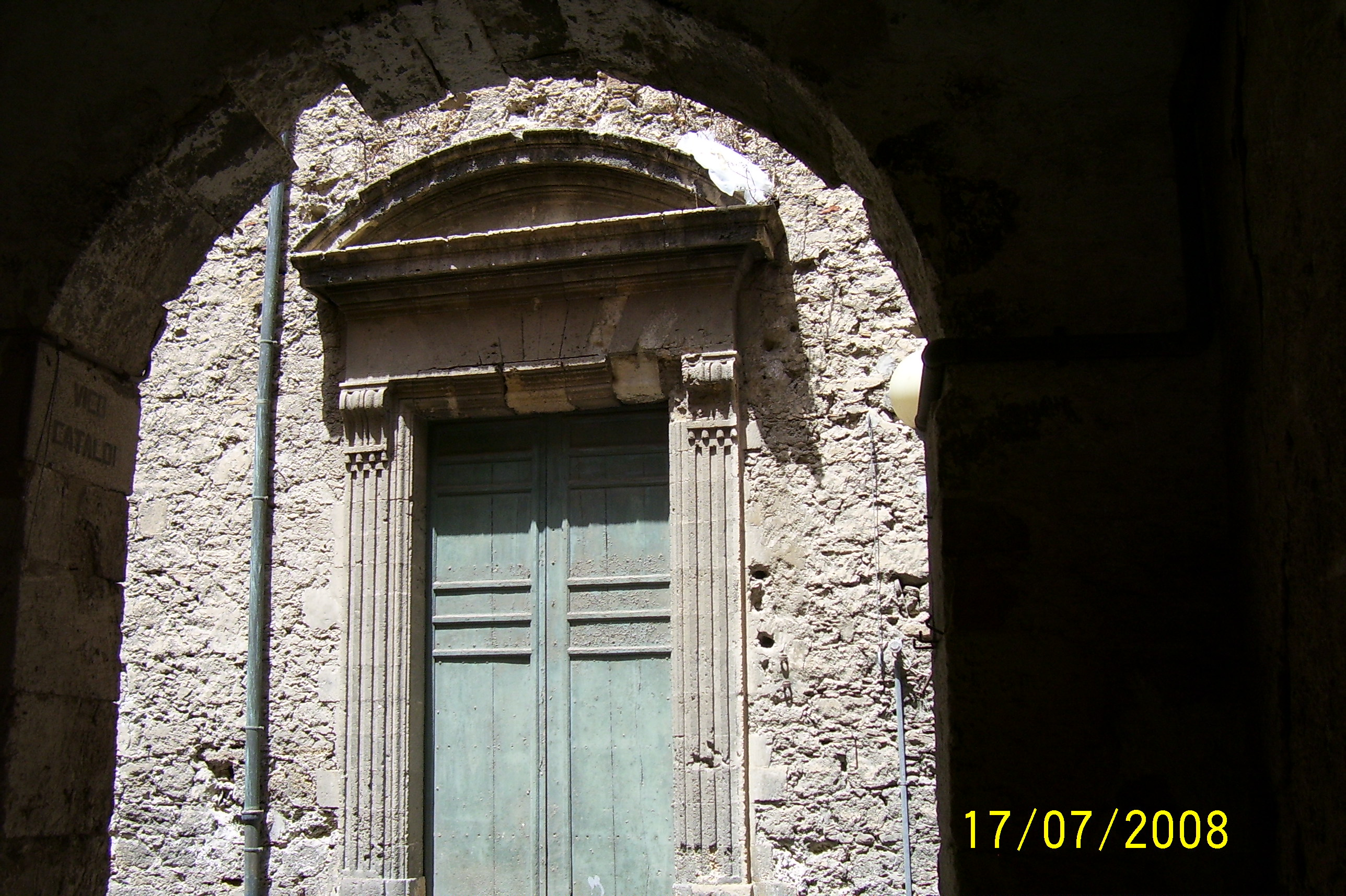 Particolare del centro storico di Gela